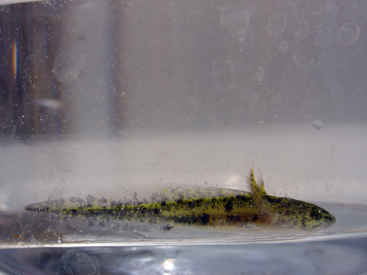 larves de Pleurodeles de Waltl